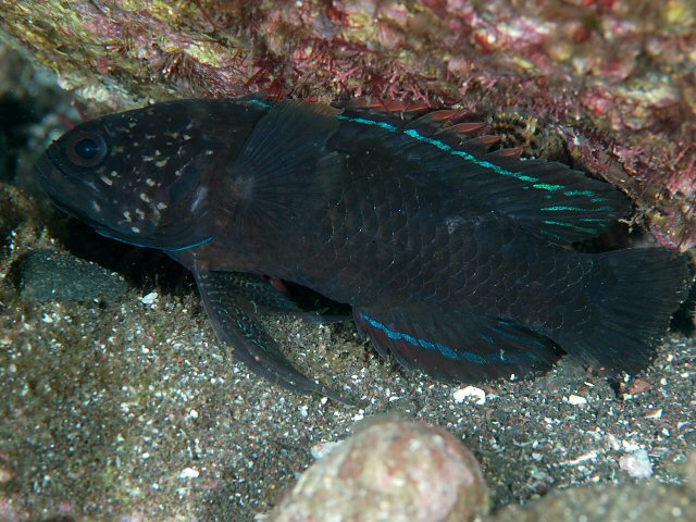 タナバタウオ Plesiops coeruleolineatus